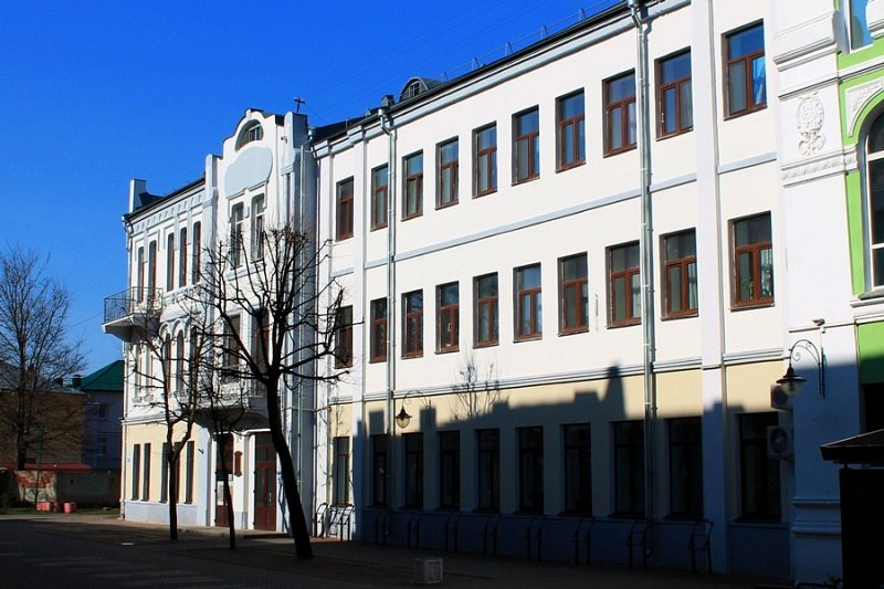 Азова-Данскі банк. Магілёў